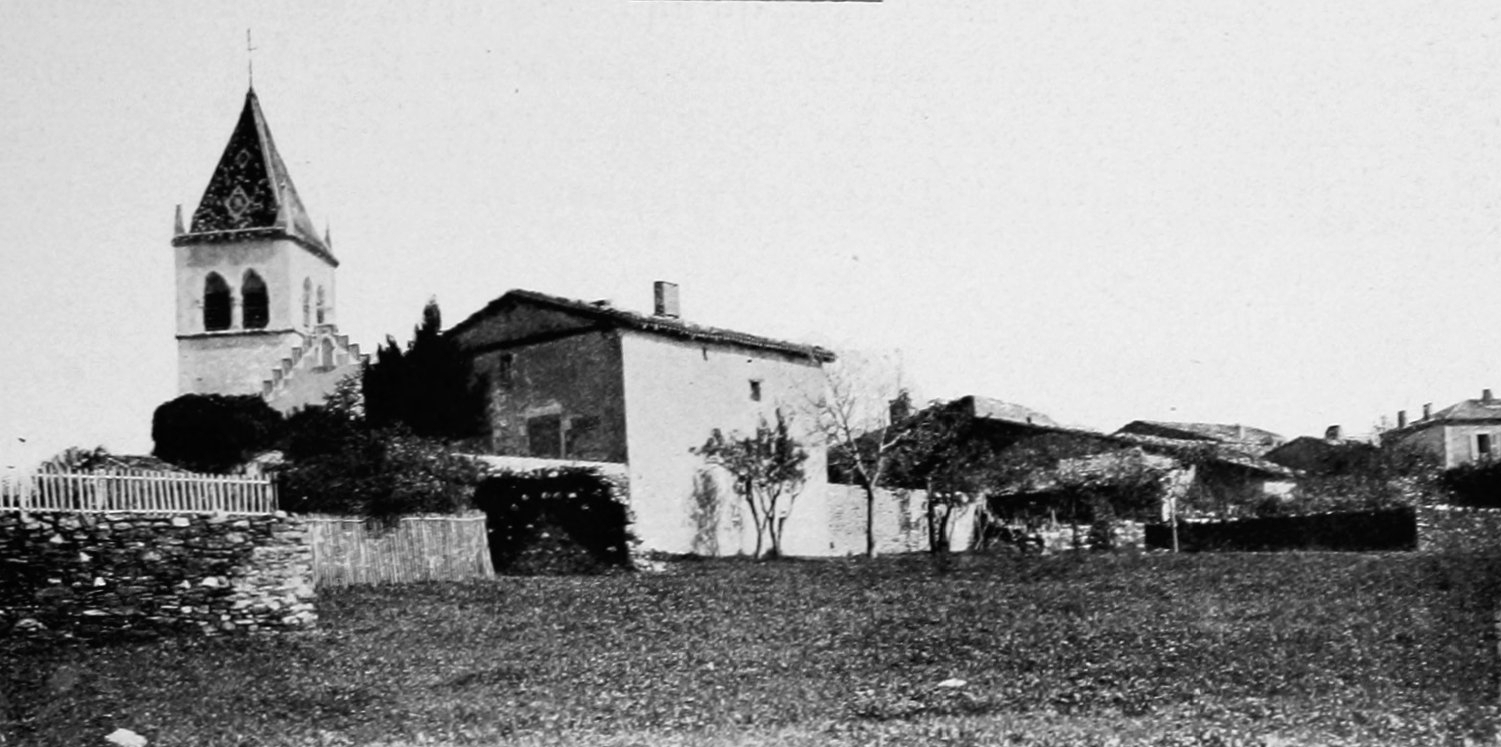 Dictionnaire illustré des communes du département du Rhône. Tome 2 / par MM. E. de Rolland et D. Clouzet.